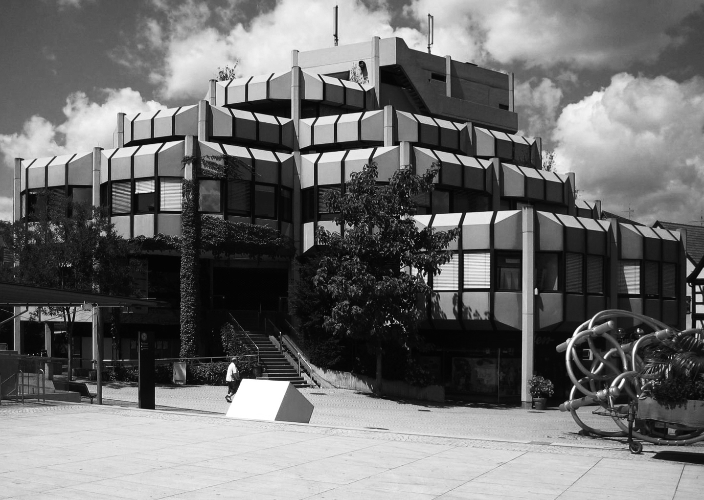 Wilfried Beck-Erlang: Marktdreieck in Waiblingen, 1971-76